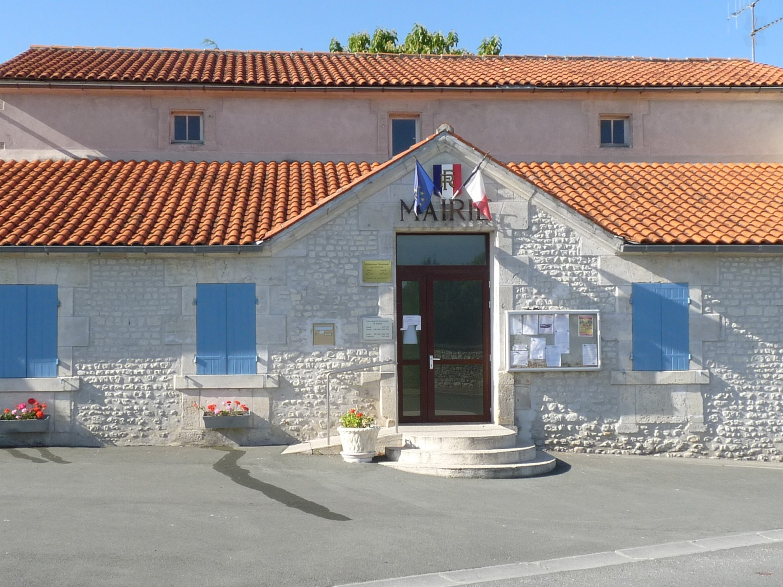 Mairie de St-Martial-sur-Né, Charente-Maritime, France